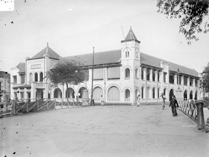 Negatief. Handelskantoor (Nederlandsche Handels Maatschappij) te Semarang